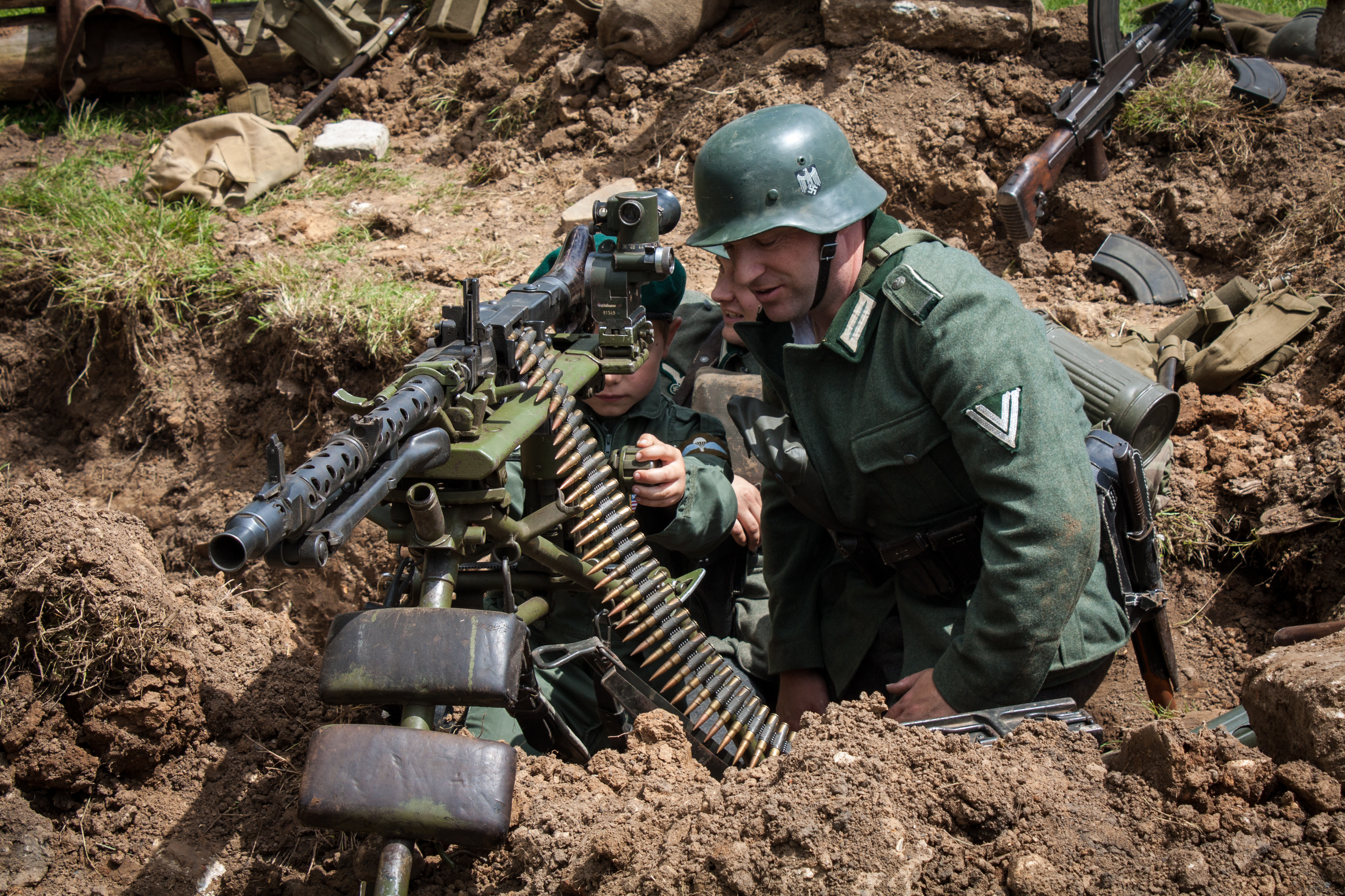 German Machine Gunner